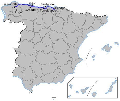 Mapa de la autovía A8